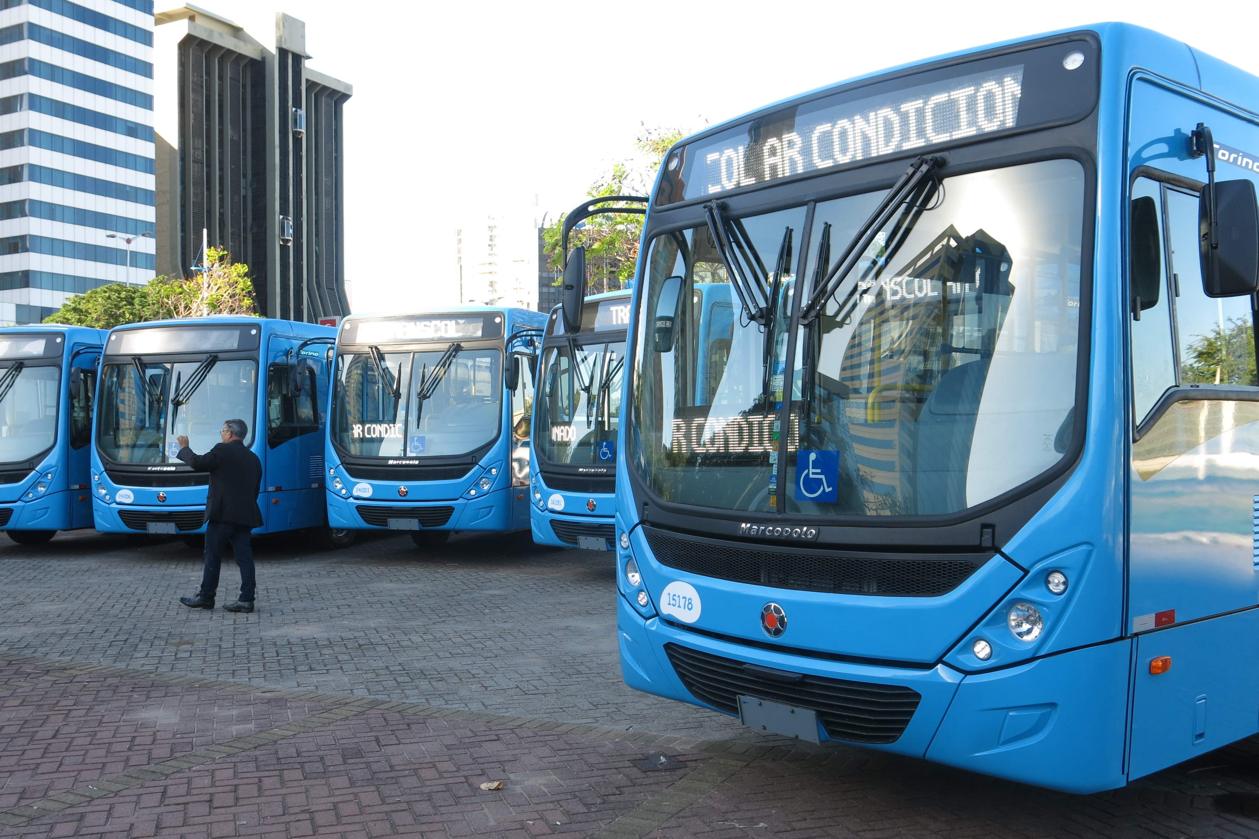 Apresentação dos novos carros do sistema Transcol com ar-condicionado, apresentados a população em 26 de junho de 2019.